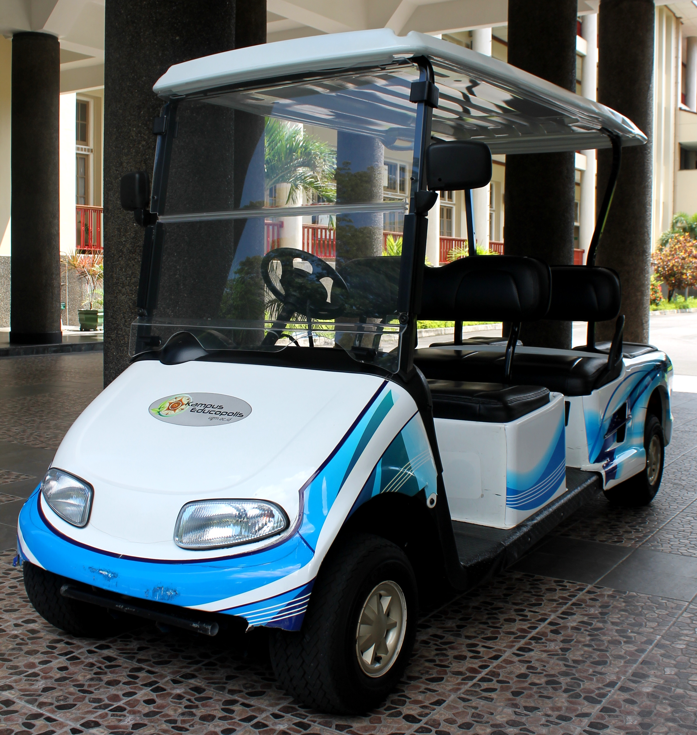 Mobil listrik UGM - eSemar Xperimental